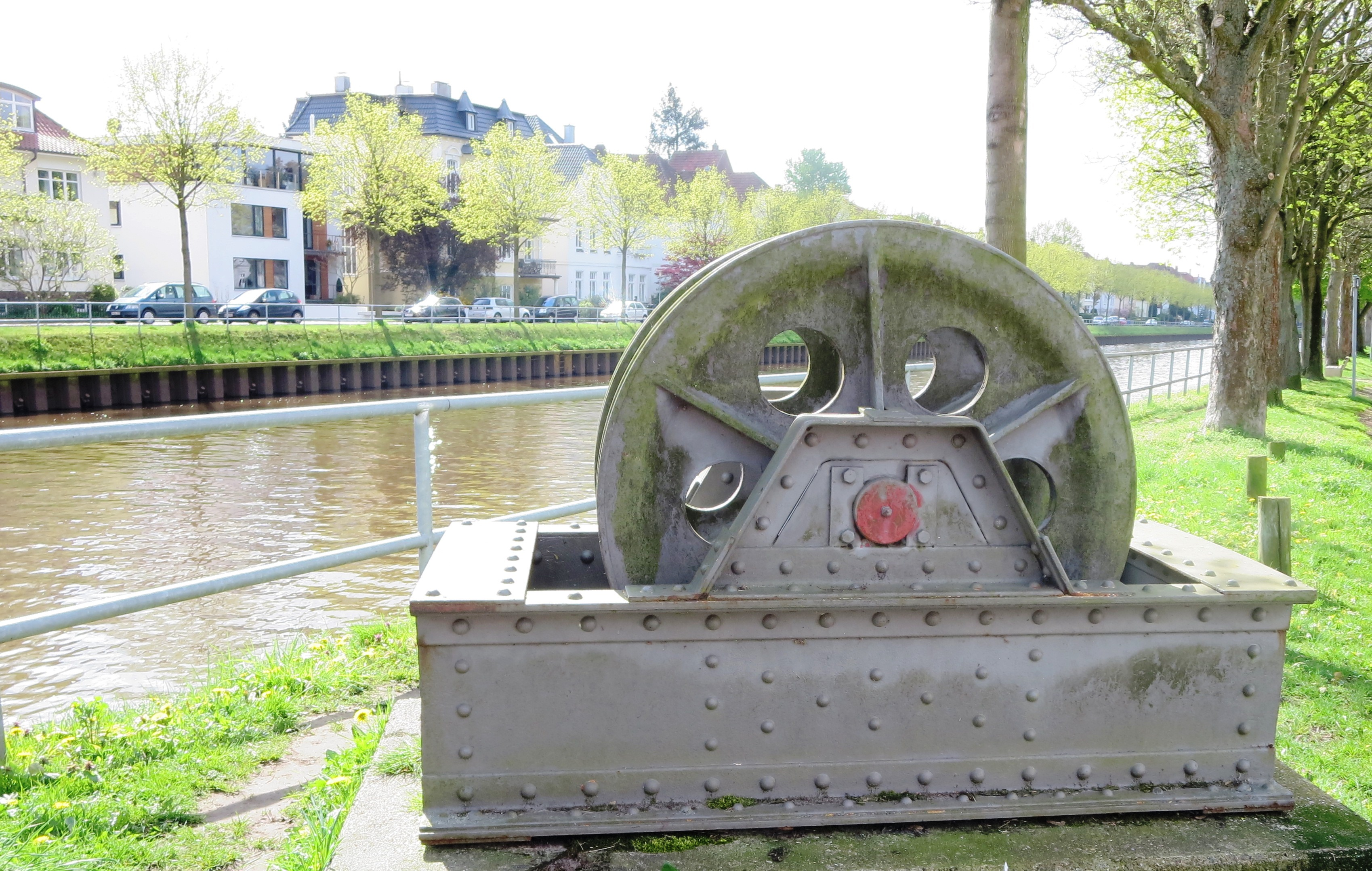 Seilrolle der ehem. Amalienbrücke Oldenburg (1926-1980)